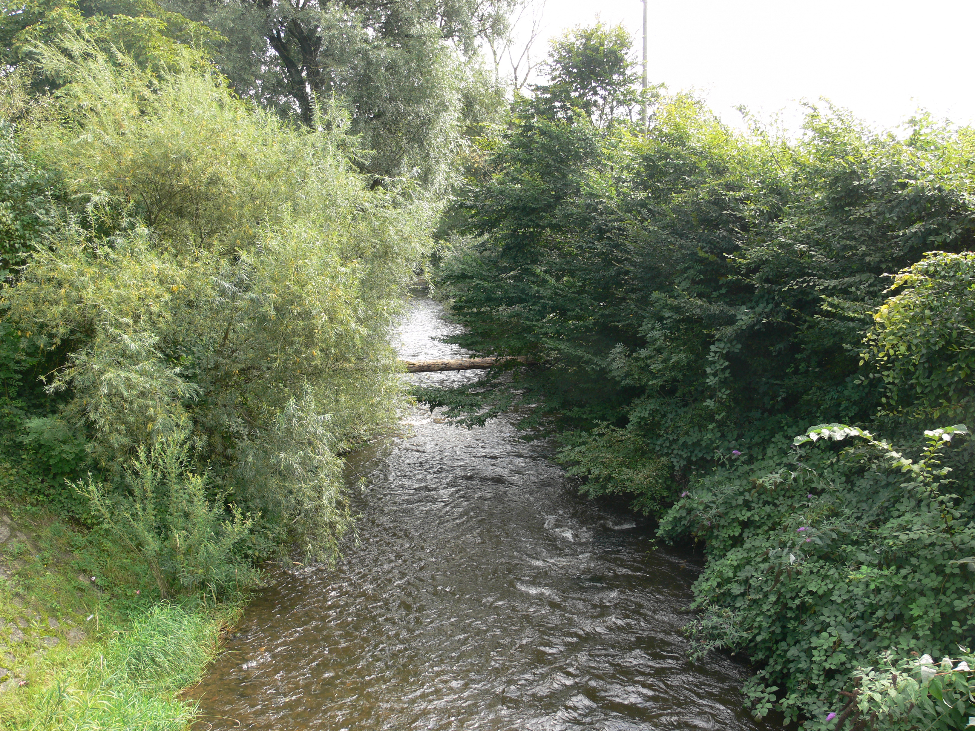 Mochenwangen, Gemeinde Wolpertswende, Landkreis Ravensburg Die Schussen in Mochenwangen